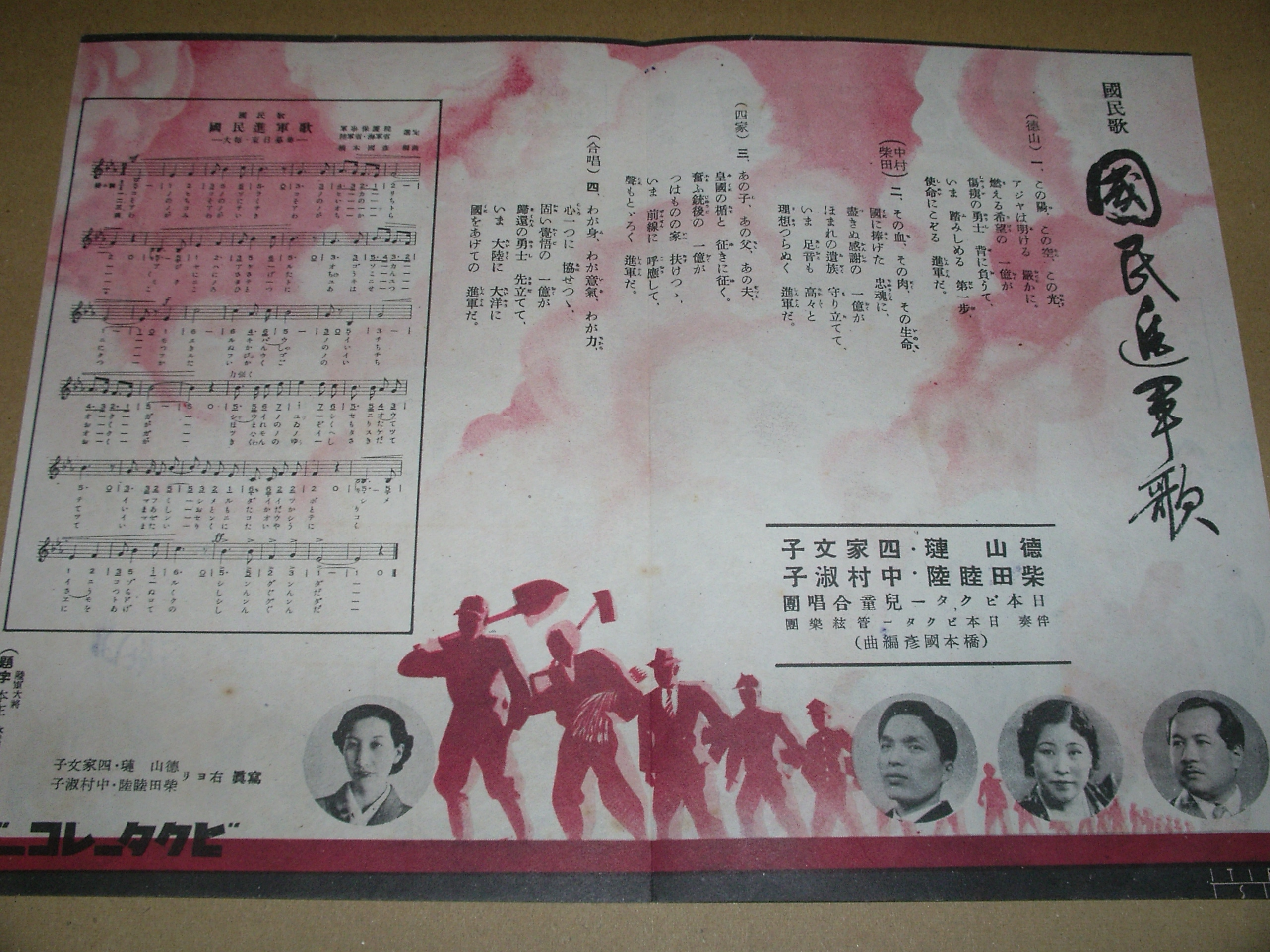 1940年にビクターレコードから発売された国民進軍歌の歌詞カードを撮影。